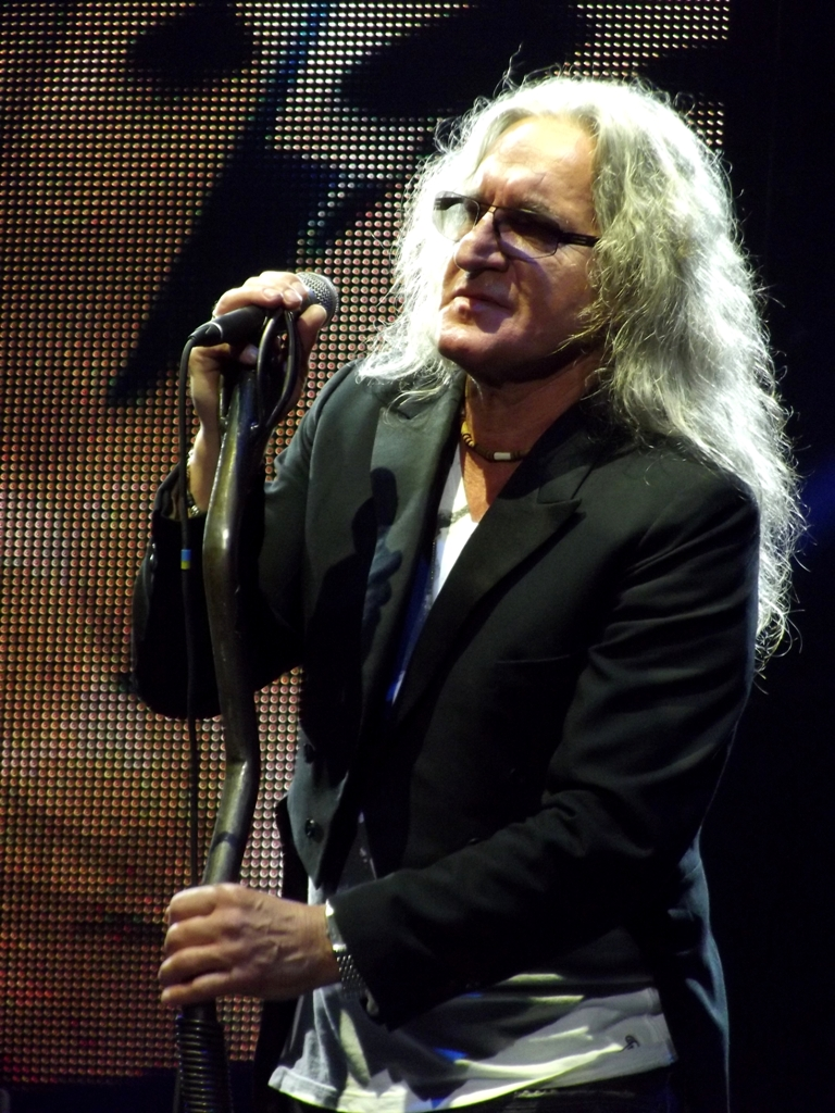 Zdjęcie zrobione podczas pierwszego dnia czwartej edycji Life Festival 2013 w Oświęcimiu.